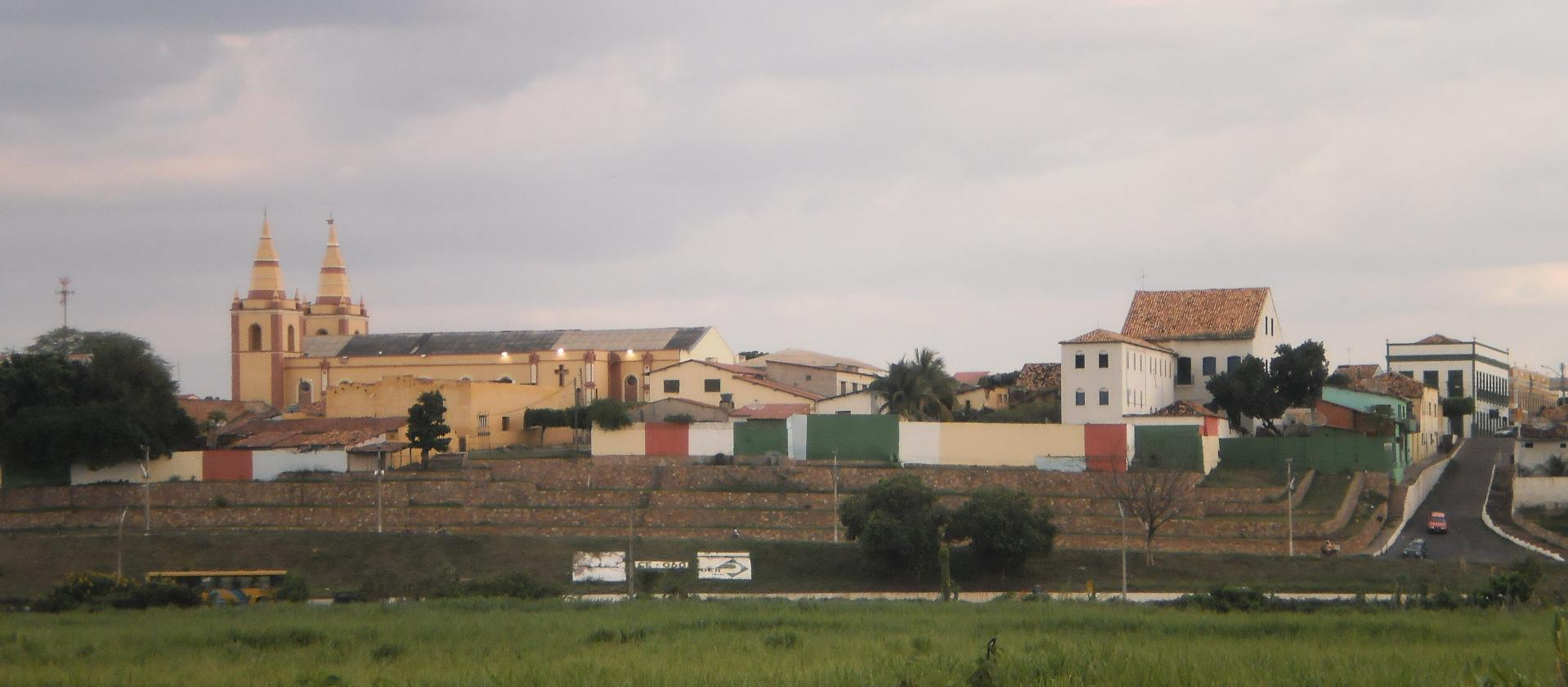 Imagem panorâmica da cidade de Barbalha (Centro histórico)